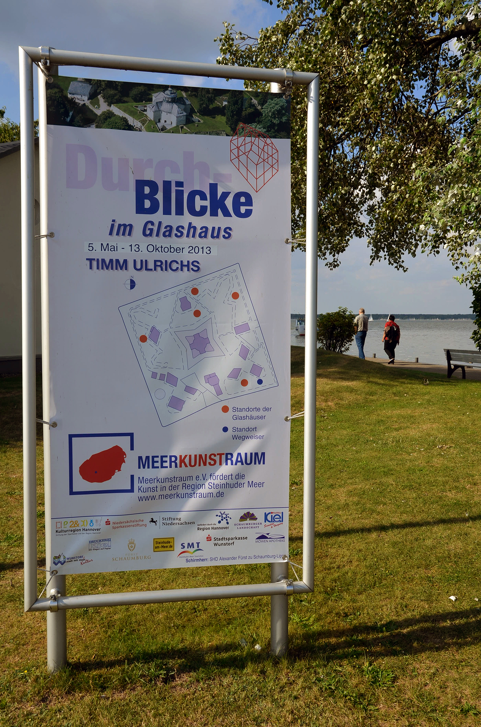 2013 entwarf der Konzeptkünstler Timm Ulrichs für seine Freiluft-Ausstellung Im Glashaus fünf Installationen unter dem Motto „Wer im Glashaus sitzt ...“. Die Ausstellung auf der Inselfestung Wilhelmstein im Steinhuder Meer wird vom 5. Mai bis 13. Oktober 2013 in der Reihe Durch-Blicke präsentiert durch den Kunstverein Meerkunstraum ...